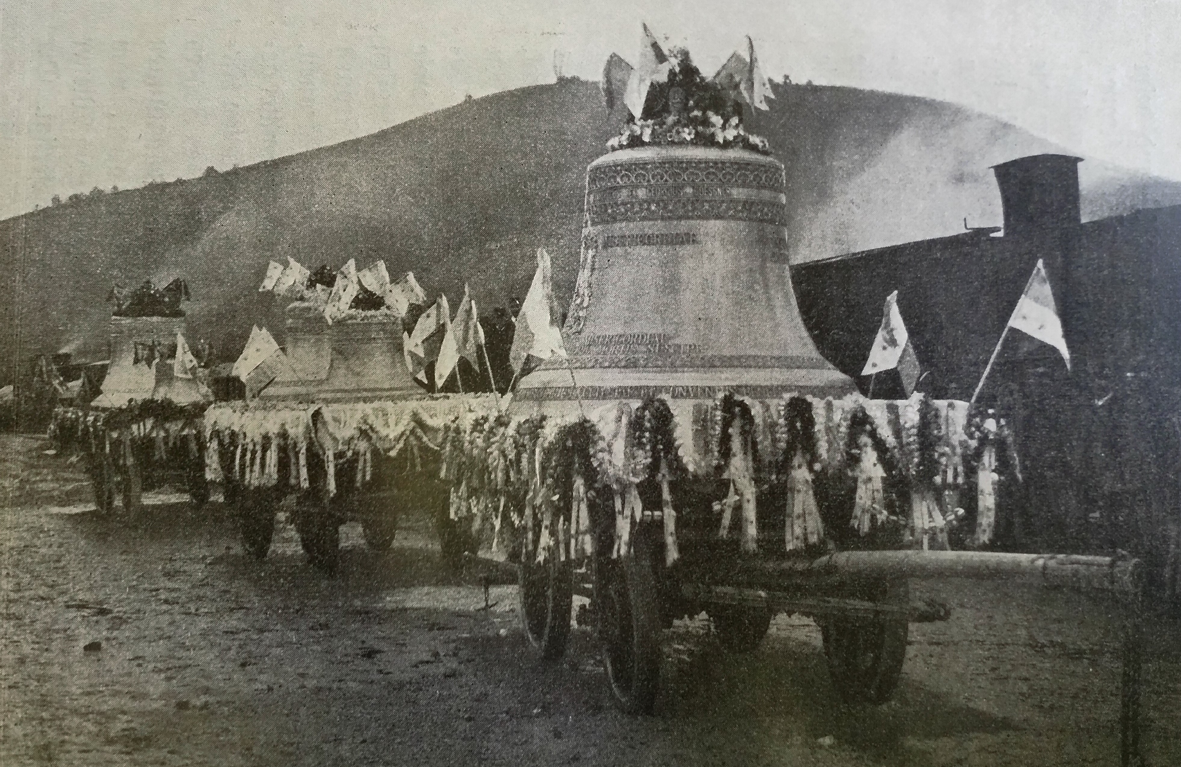 Prevoz zvonov v frančiškansko cerkev v Mariboru ob posvetitvi cerkve z železniške postaje.